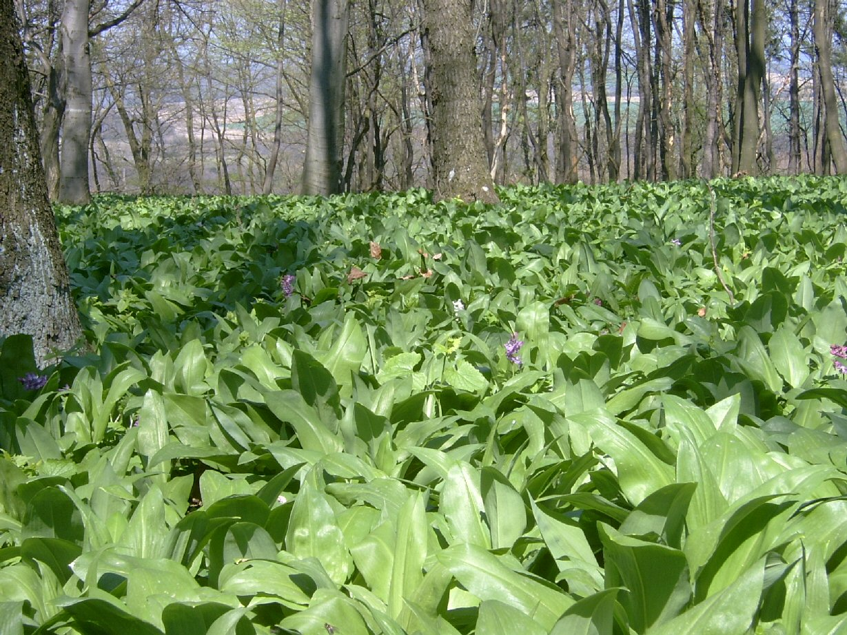 Medvehagyma